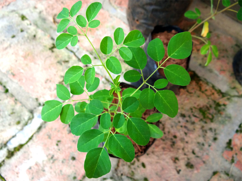 moringa oleifera